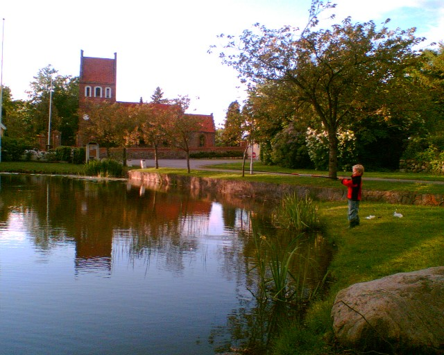 the village pond at Esbonderup, Denmark